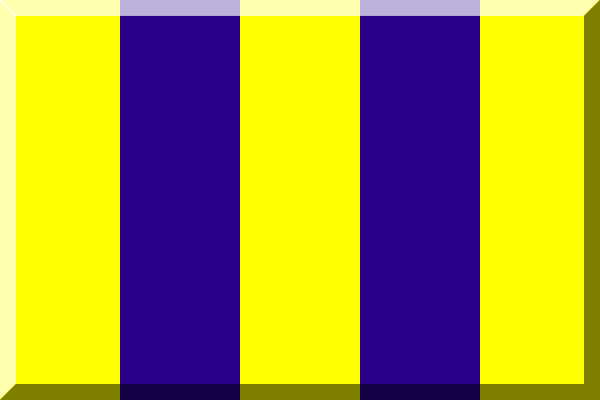 Giallo e Blu (Strisce)